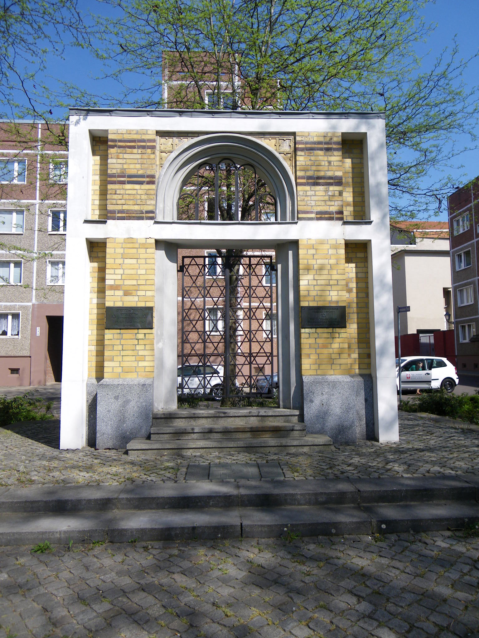 Denkmal/ Portal der ehem. Synagoge Beton, Klinker, Metall, Bronze Jerusalemer Platz